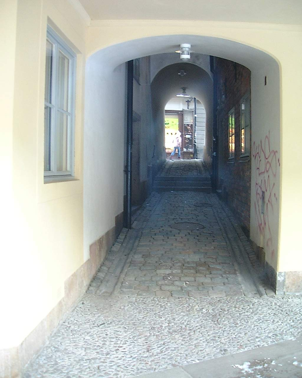 Klockgjutargränd, Gamla stan, Stockholm